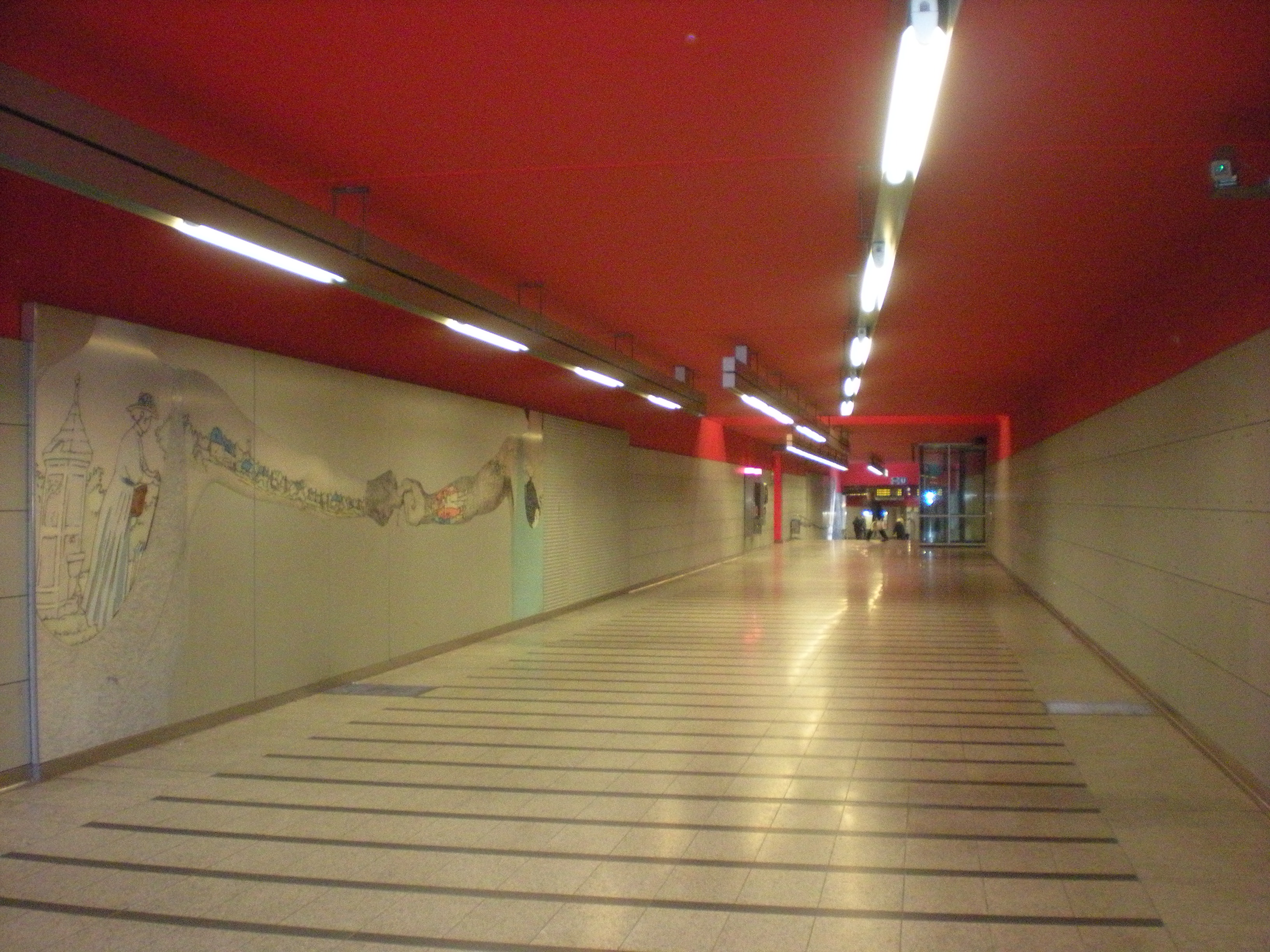 Östlicher Verbindungstunnel des Bahnhofs München-Trudering mit Fingerhakel-Darstellung